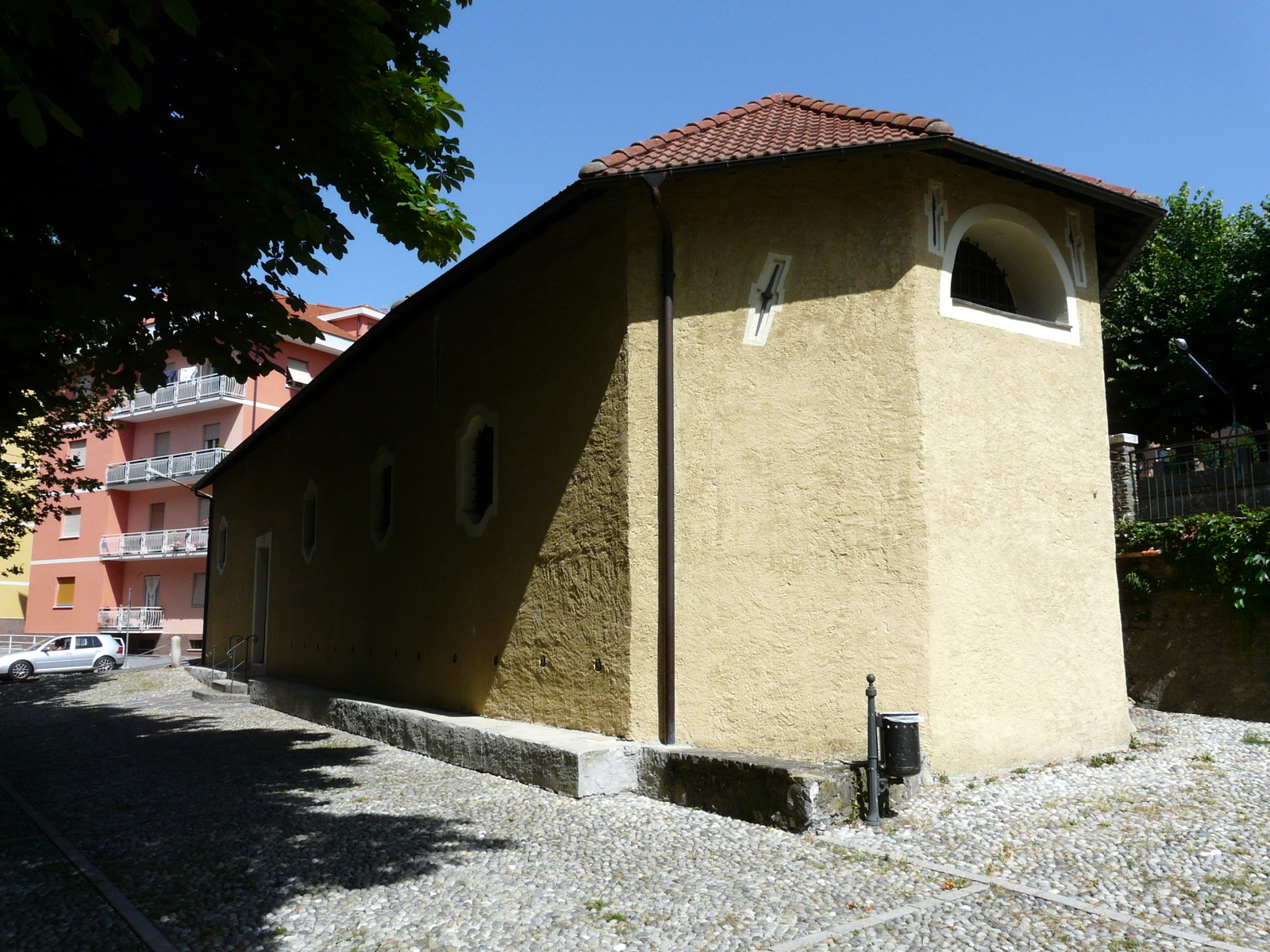 L'oratorio di Sant'Antonio abate, Casella, Liguria, Italia